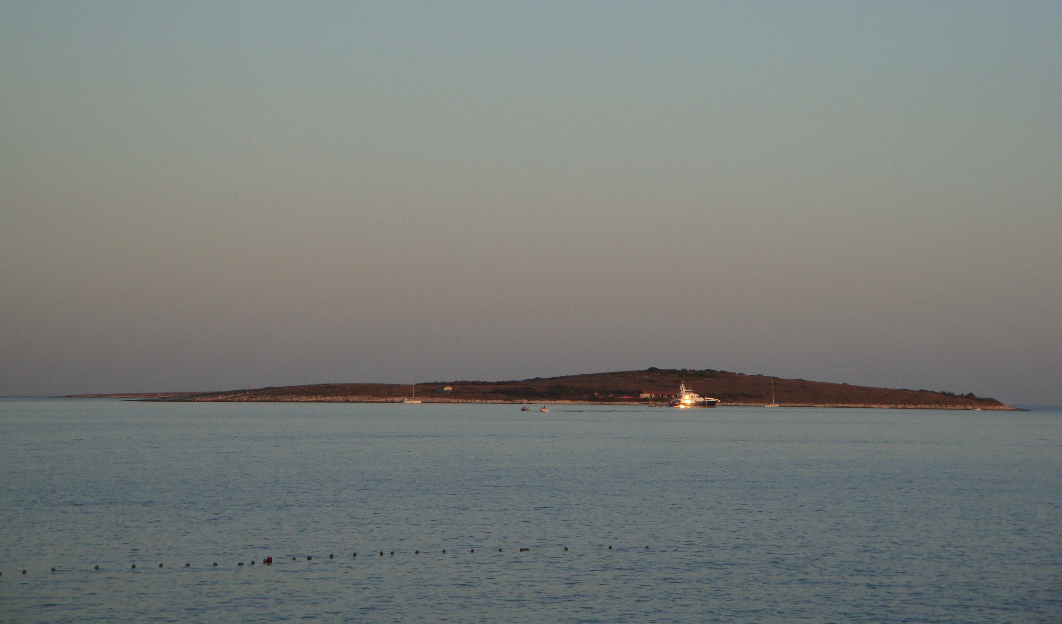 Otoček Ceja v Medulinskem zalivu, Istra.